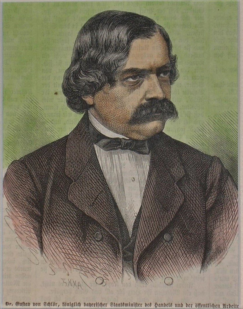 Gustav von Schlör, königich bayerischer Staatsminister des Handels und der öffentlichen Arbeiten, teilkolorierter Holzstich, ca. 13 x 11 cm